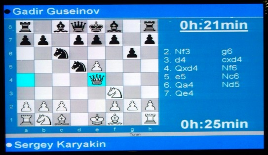 трансляция турнира сб. Азербайджана и Мира на экране